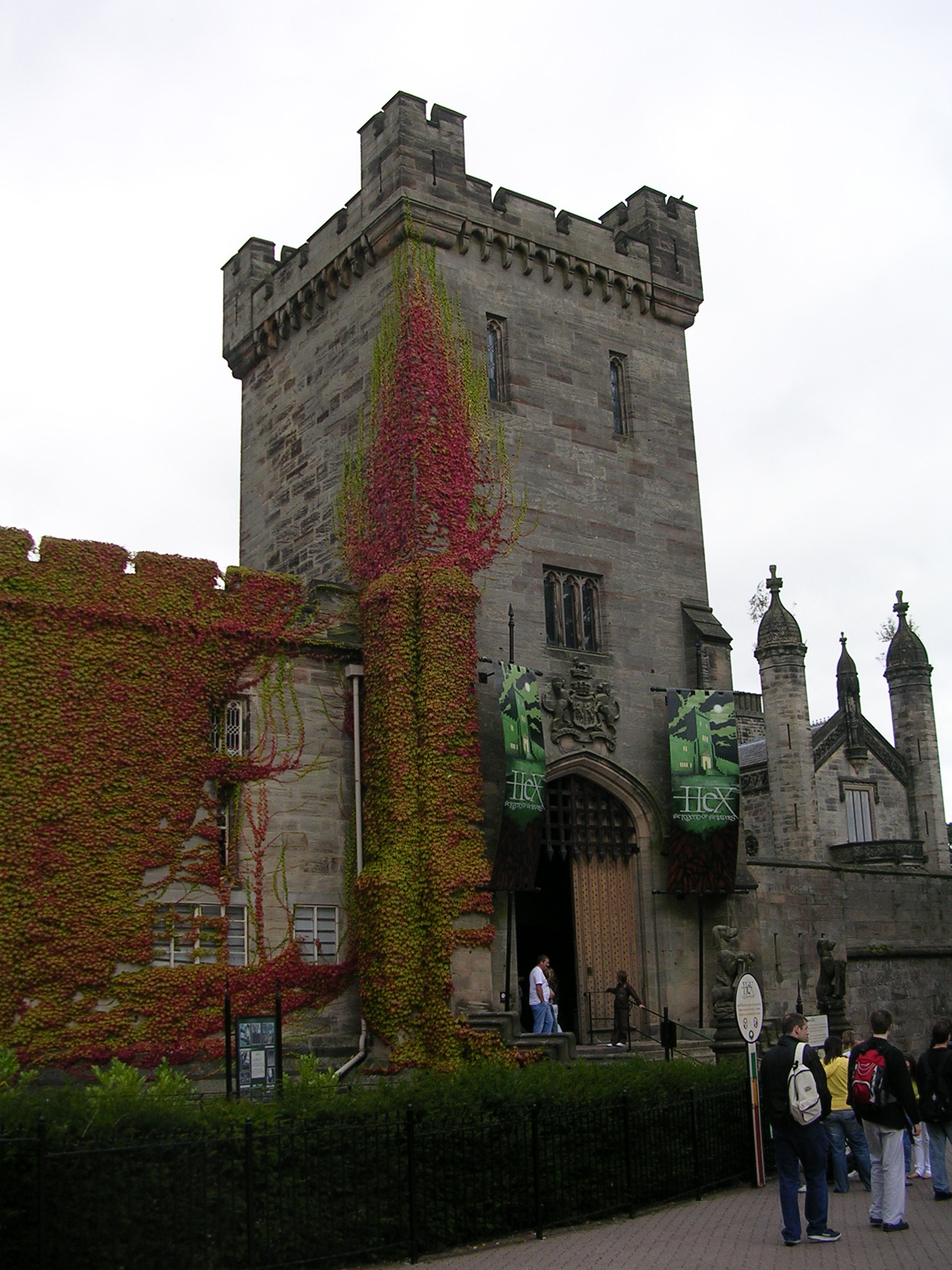 Entrée de l'attraction "Hex" au parc Alton Towers. Photo prise en septembre 2007 avec un Nikon coolpix 3200.